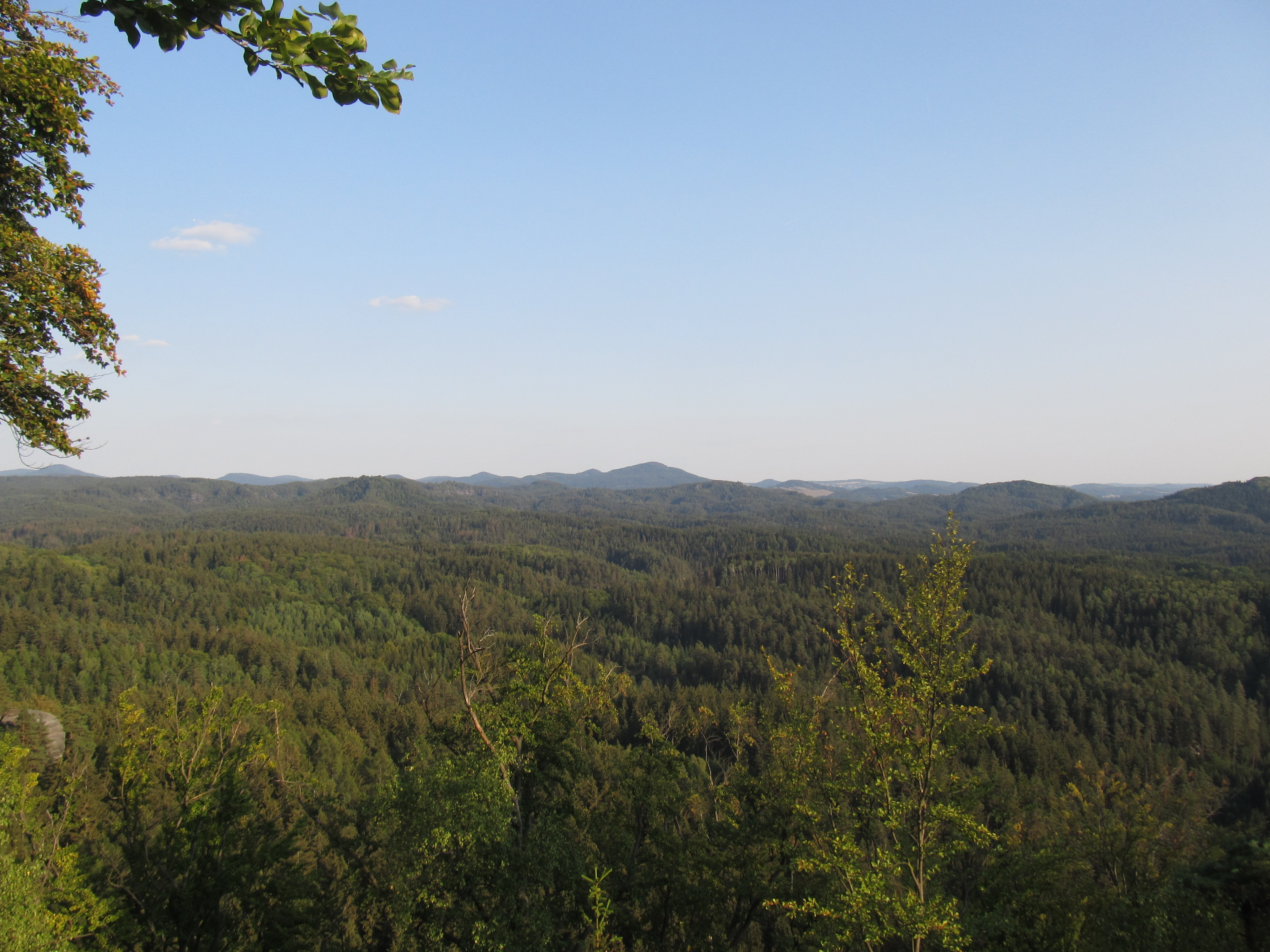 Aussicht in Richtung Südosten vom Aussichtspunkt Königsplatz in der Sächsischen Schweiz, südlich von Hinterhermsdorf, Große Kreisstadt Sebnitz, Landkreis Sächsische Schweiz-Osterzgebirge.